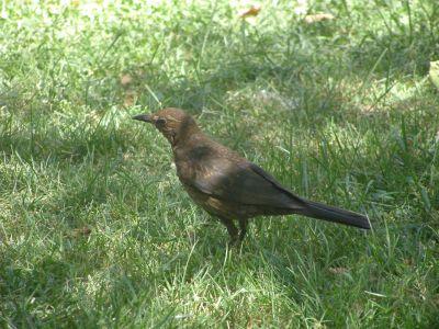 Turdus merula